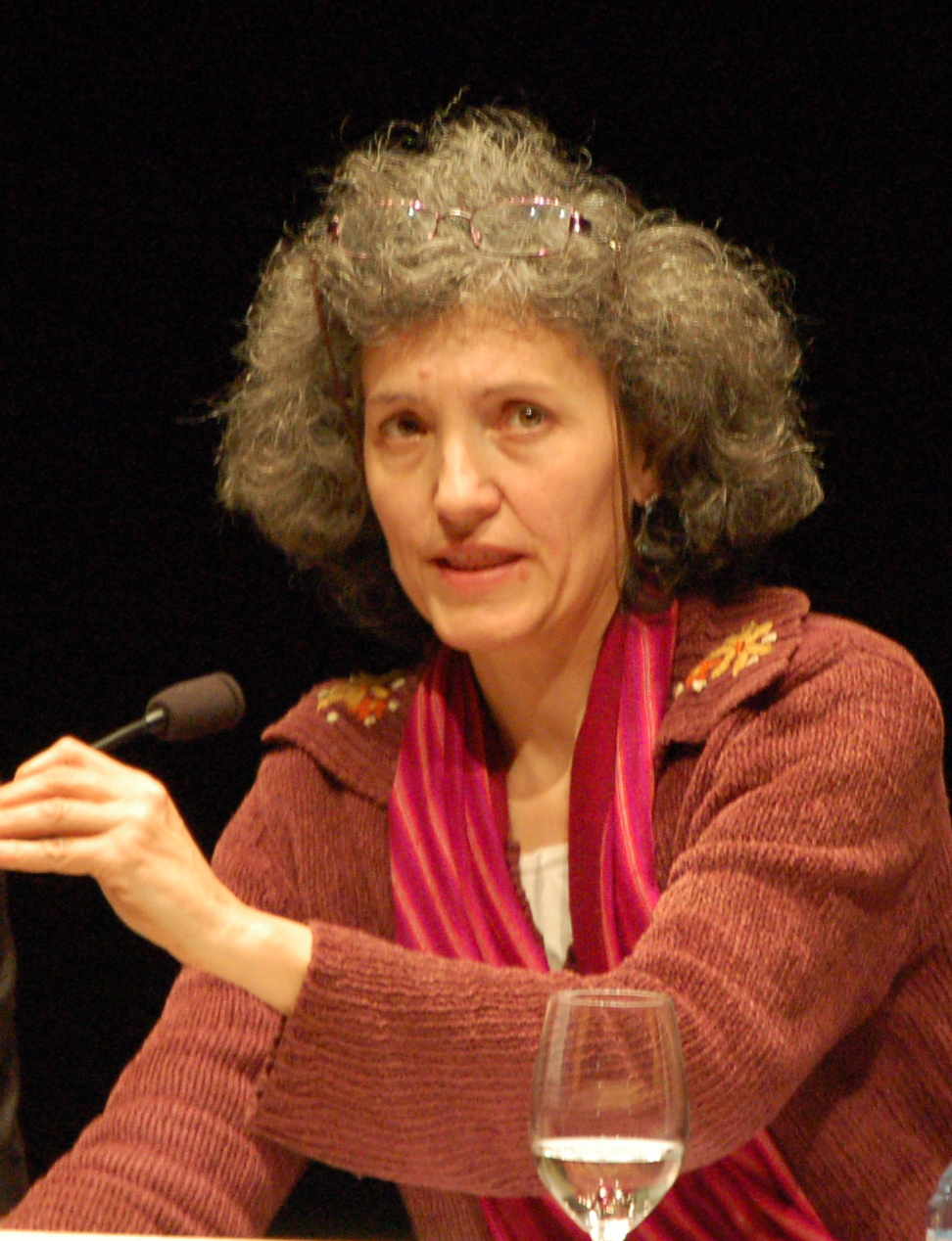 Lidia Senra (daquela Secretaria de Organización do Sindicato Labrego Galego) na XXVII Semana Galega de Filosofía